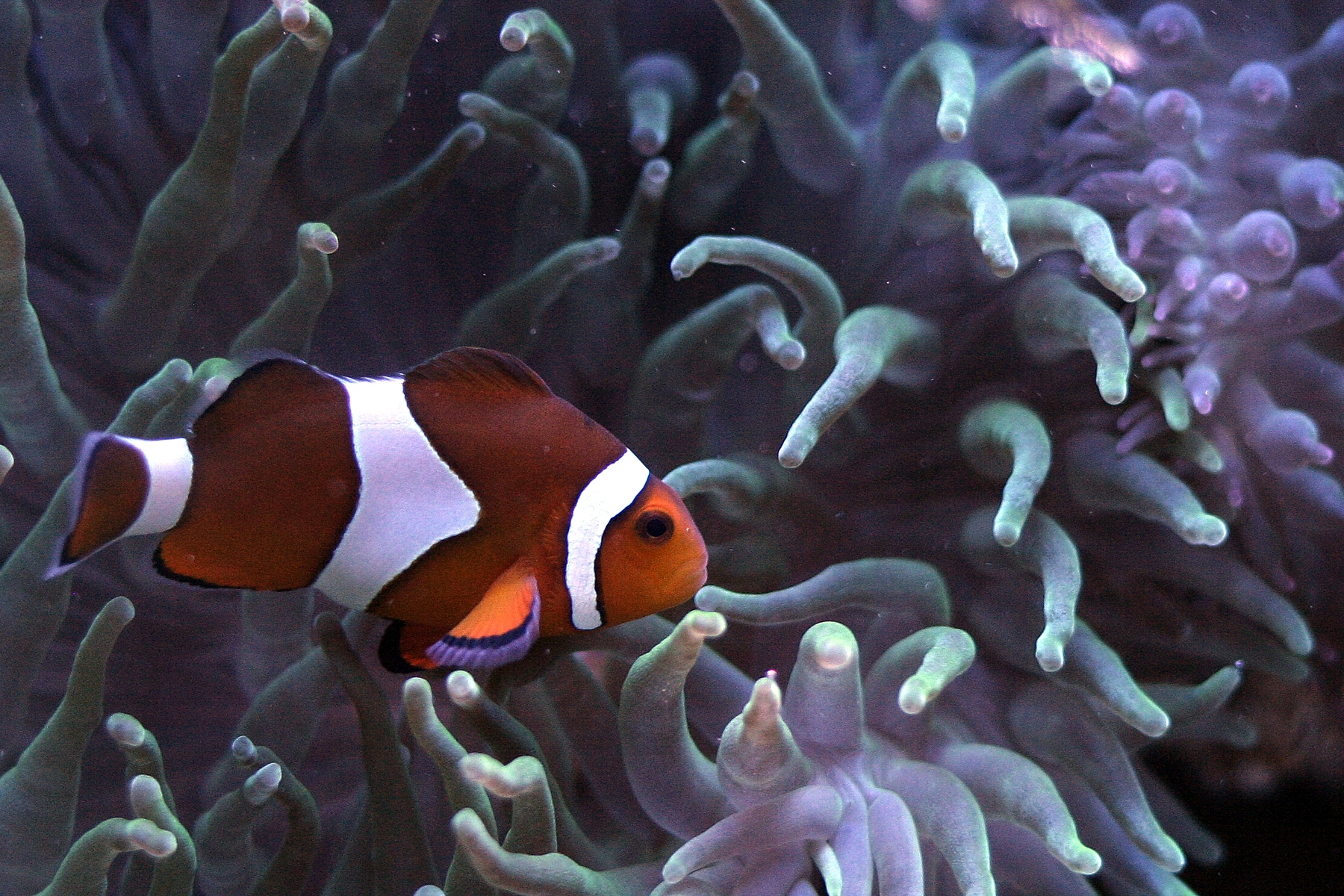 Pez payaso - Palma Aquarium